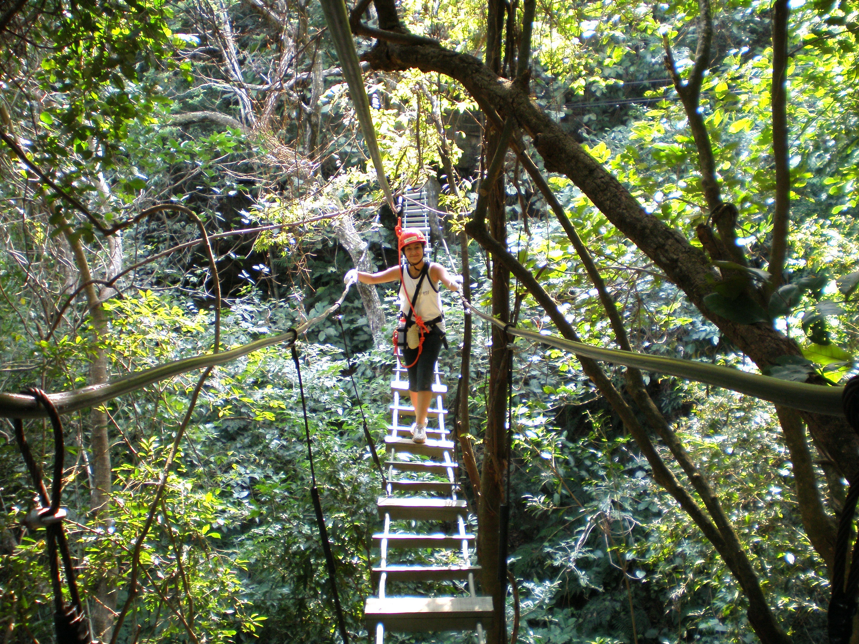 Puente colgante. Reserva Mbatovi